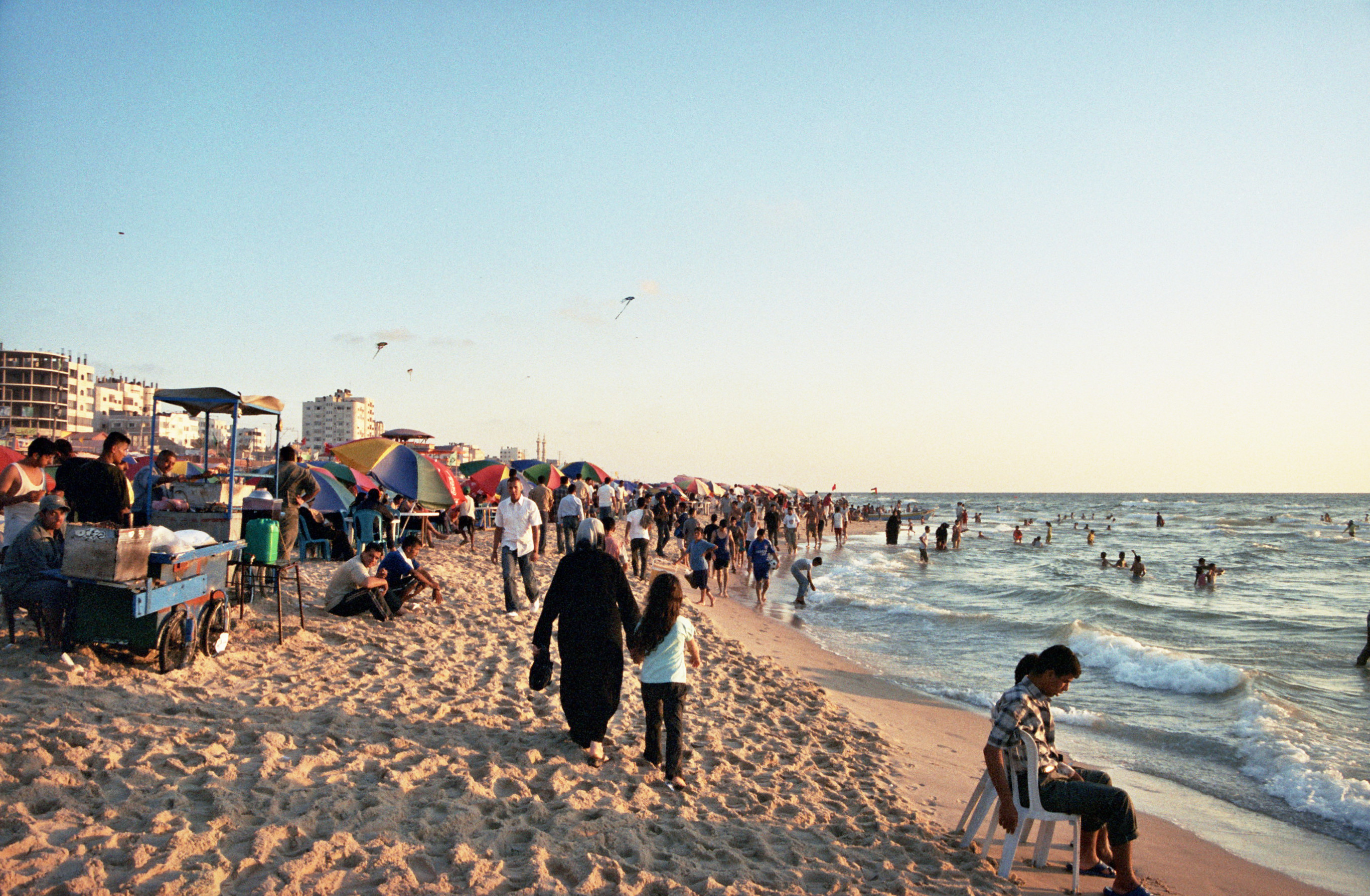 Gaza Beach